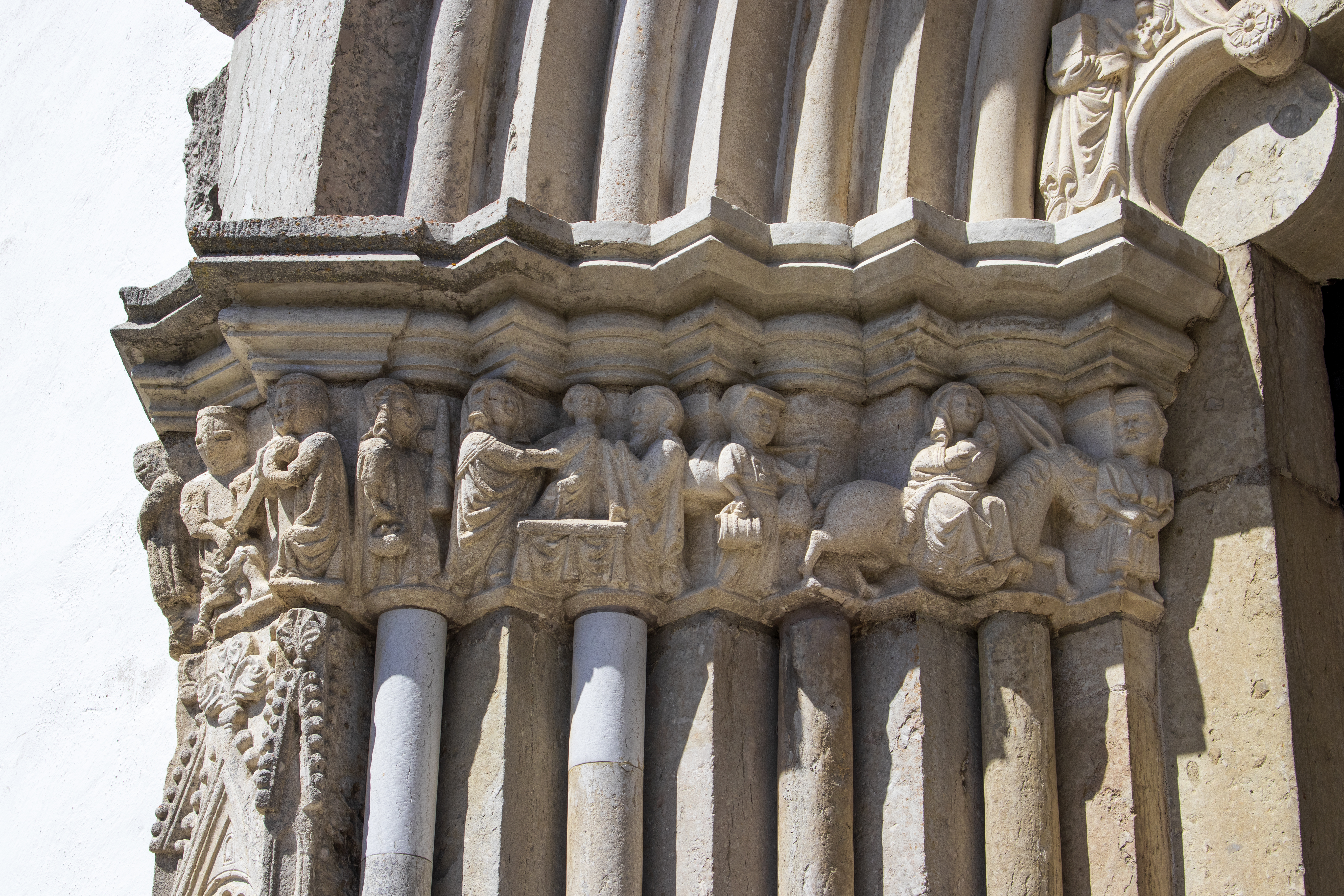 Capiteis do portal da nave da igrexa de Stånga, na illa sueca de Gotland.